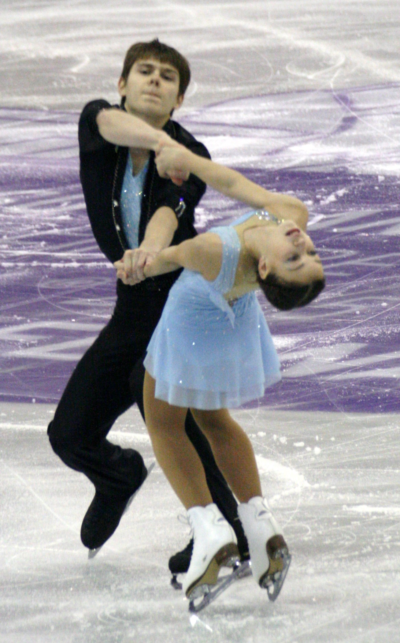 Анастасия Губанова и Алексей Синцов (Россия) на финале Гран-при по фигурному катанию среди юниоров 2015-2016.